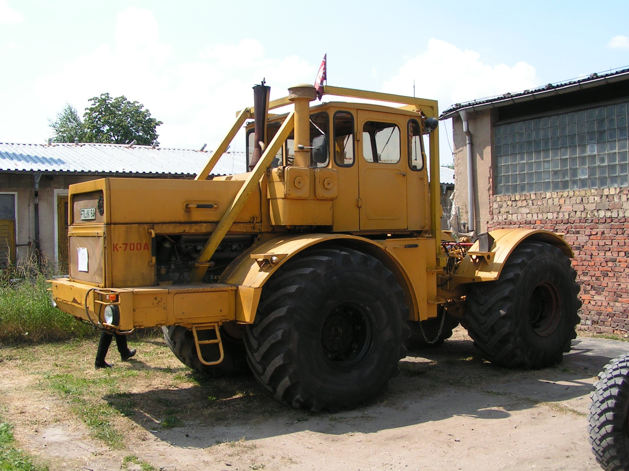 Kirovets K-700 A in Dresden Roßthal, Schulfest 2010